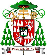 Znak arcibiskupa Josefa Karla Matochy